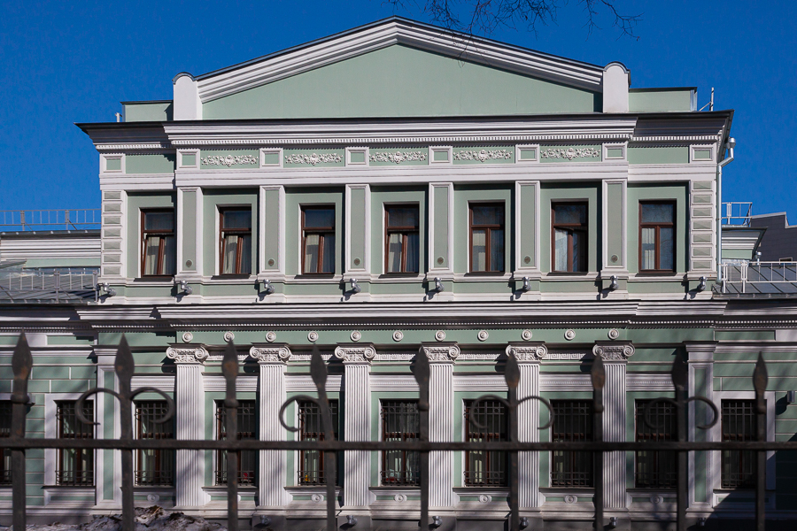 Городская усадьба Е. Н. Вандышниковой — Э. М. Банза — архитектурный ансамбль в Москве по адресу ул. Воронцово поле, д. 3. Нынешний облик усадьбы сложился в конце XIX века в результате многочисленных перестроек главного особняка и флигелей под руководством архитекторов С. Ф. Воскресенского и С. А. Коссова.